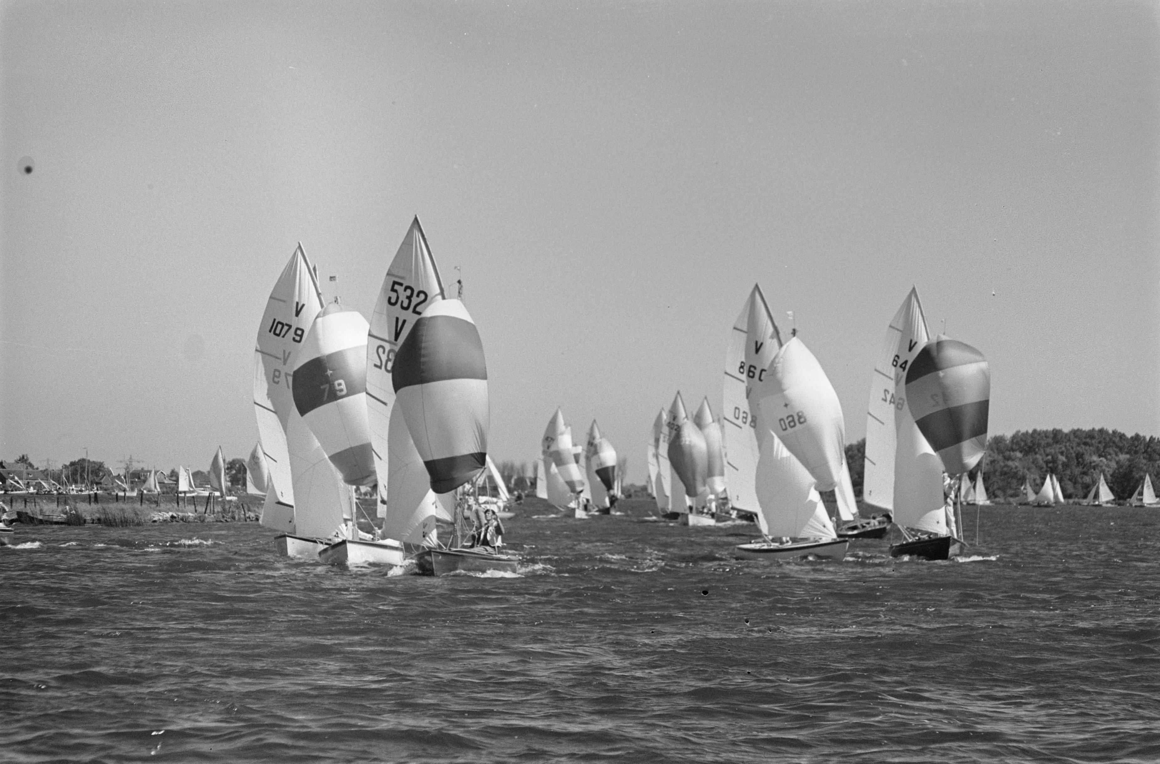 Collectie / Archief : Fotocollectie Anefo Reportage / Serie : [ onbekend ] Beschrijving : Kaagweek 1963 . De Regenbogen gaan voor de wind. Het veld van de vrijheidsklasse voor de wind Datum : 21 juli 1963 Persoonsnaam : Kaagweken Fotograaf : Koch, Eric / Anefo Auteursrechthebbende : Nationaal Archief Materiaalsoort : Negatief (zwart/wit) Nummer archiefinventaris : bekijk toegang 2.24.01.05 Bestanddeelnummer : 915-3695